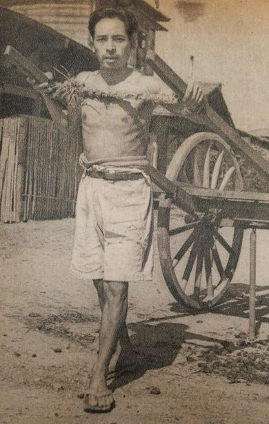 中島時一（中島啓之の父）